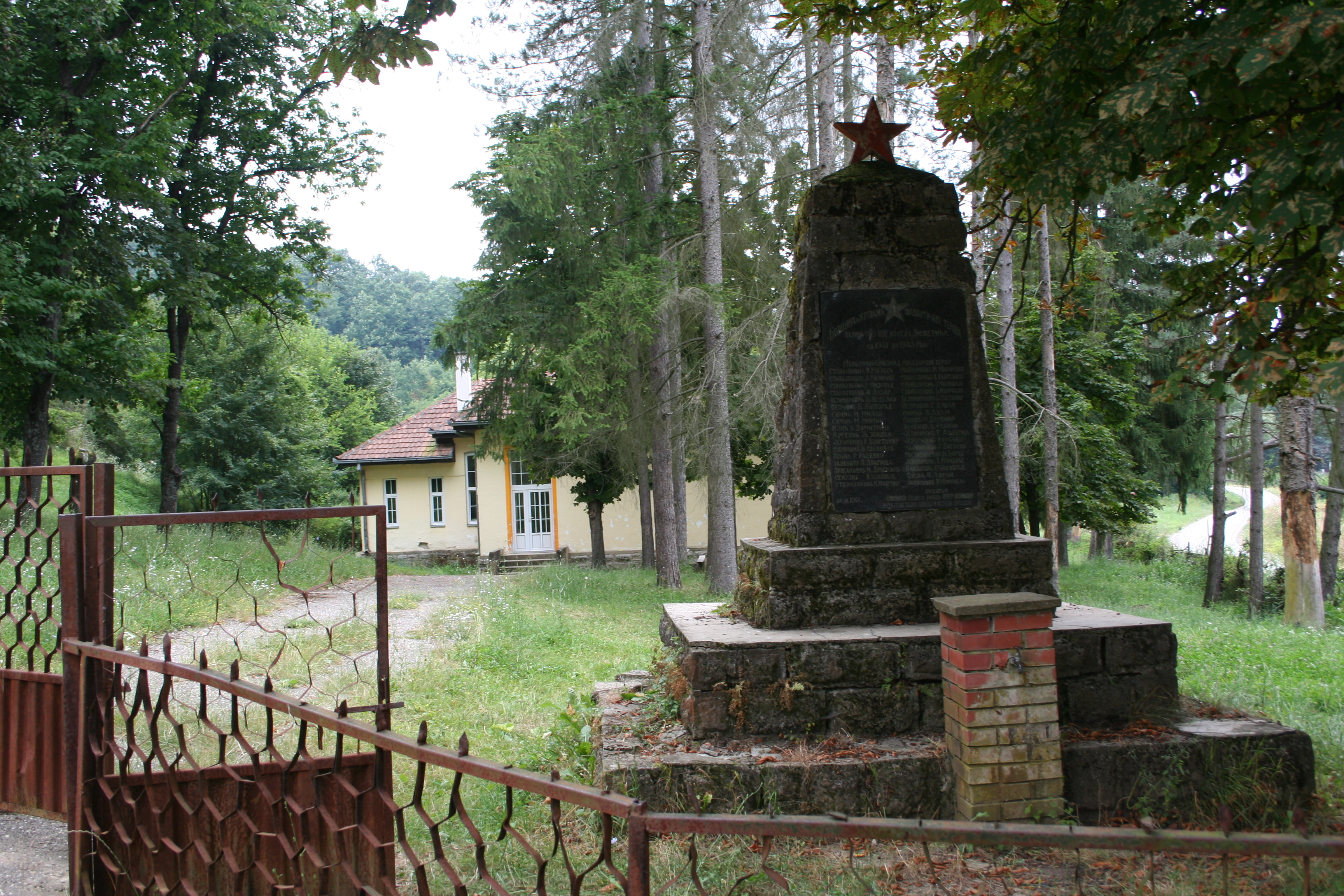 Spomenik NOB-a u dvorištu škole, Družetić